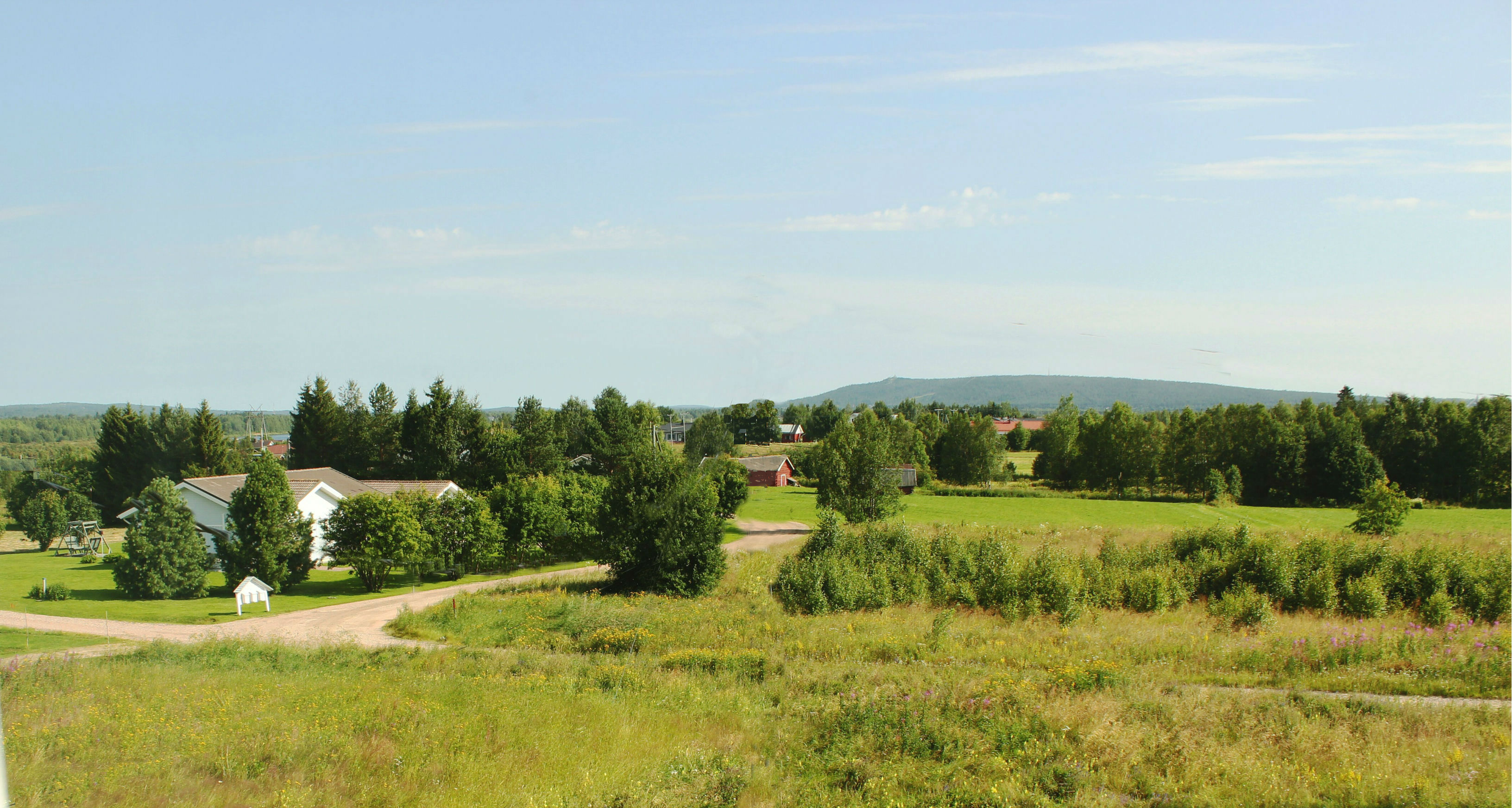 Maisema Rovaniemen Ylikylässä on pääosin maaseutumaista.